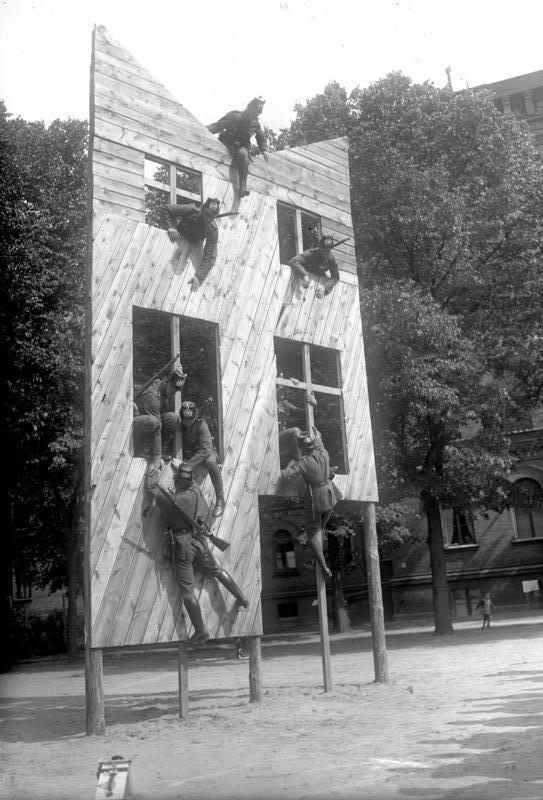 Interessante Uebung der Berliner Schutzpolizei! Das provisorische Haus, eine Bretterwand, an welcher die Polizisten das Erklettern einer glatten Fassade üben.